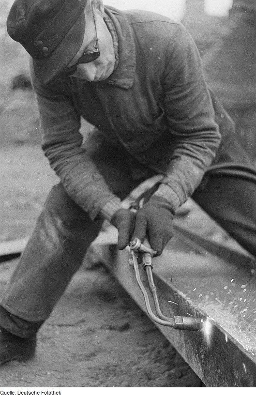 Original image description from the Deutsche FotothekArbeiter beim autogenen Brennschneiden eines Trägers